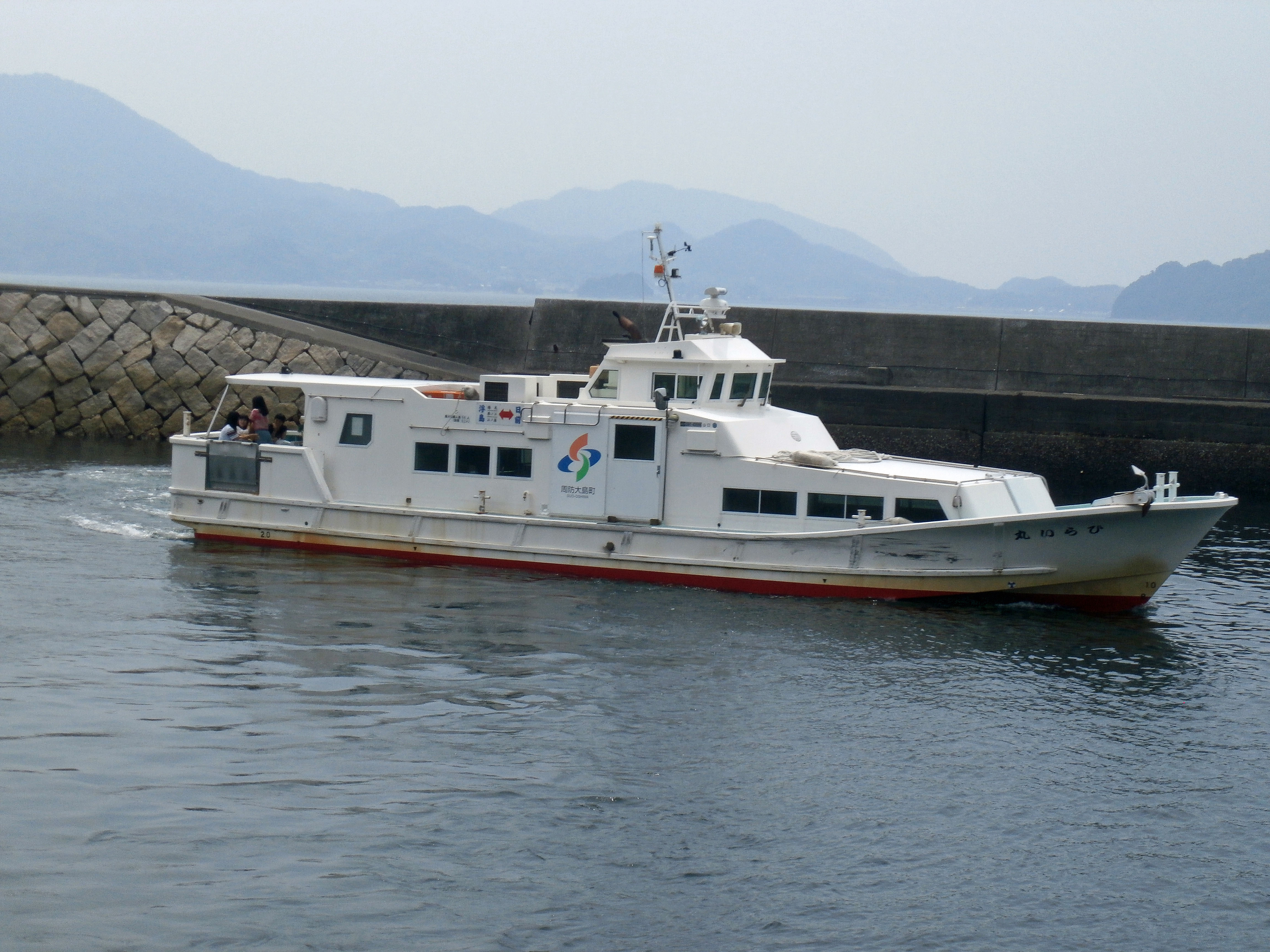 周防大島町が運行する町営フェリー、ひらい丸